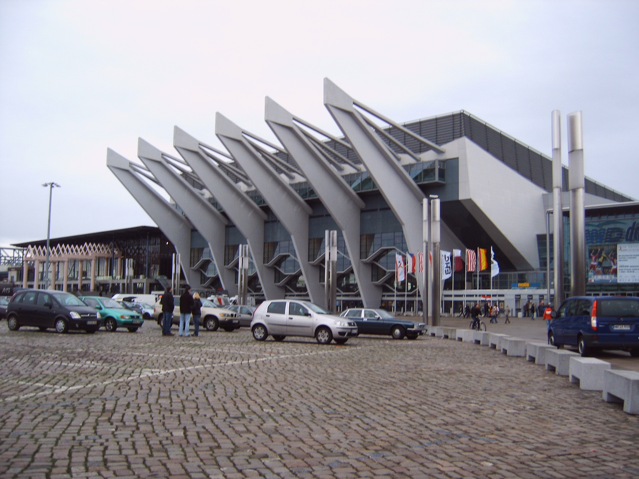 AWD Dome Bremen - Handball WM07